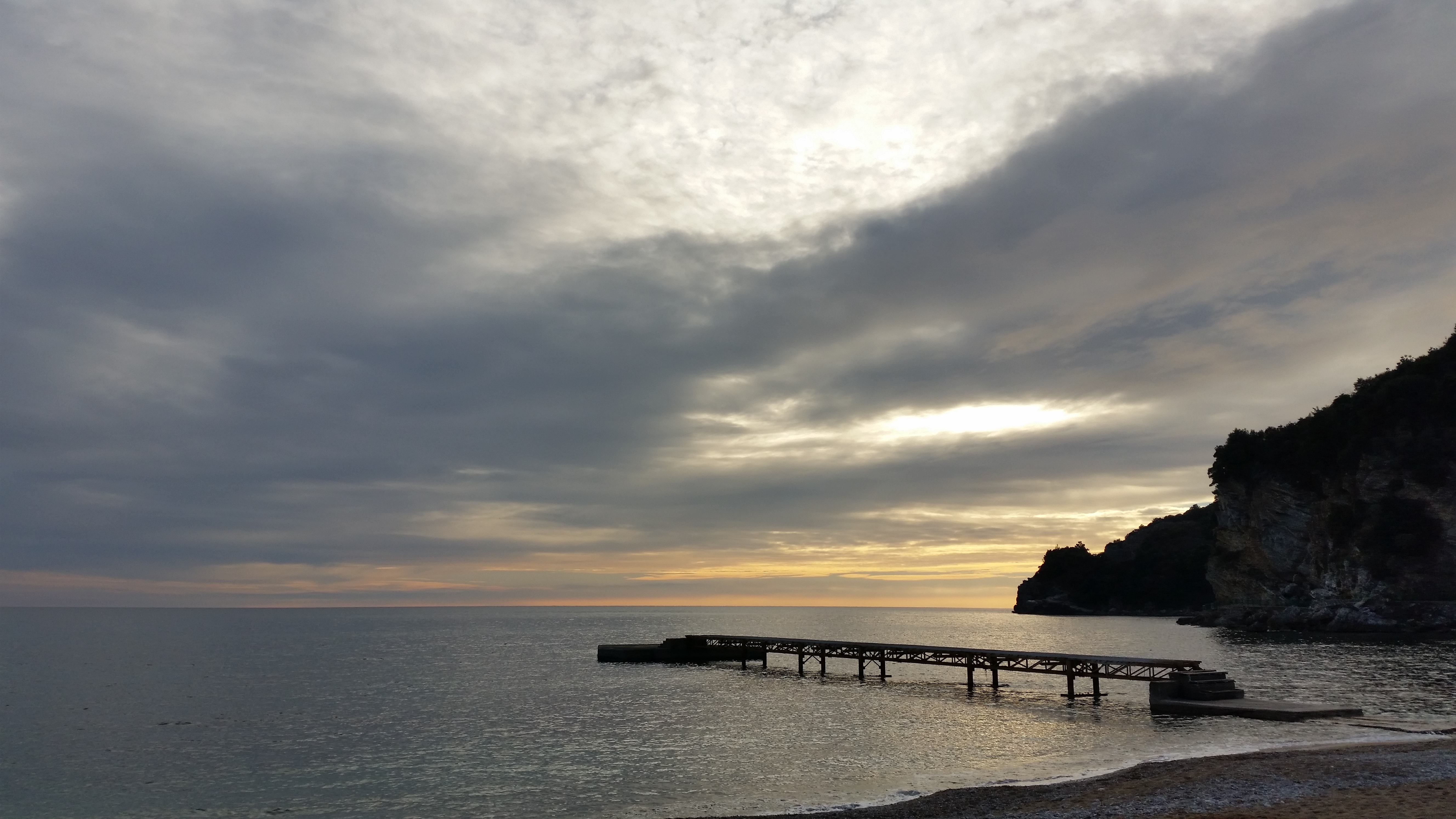 Njegoševa, Budva, Montenegro